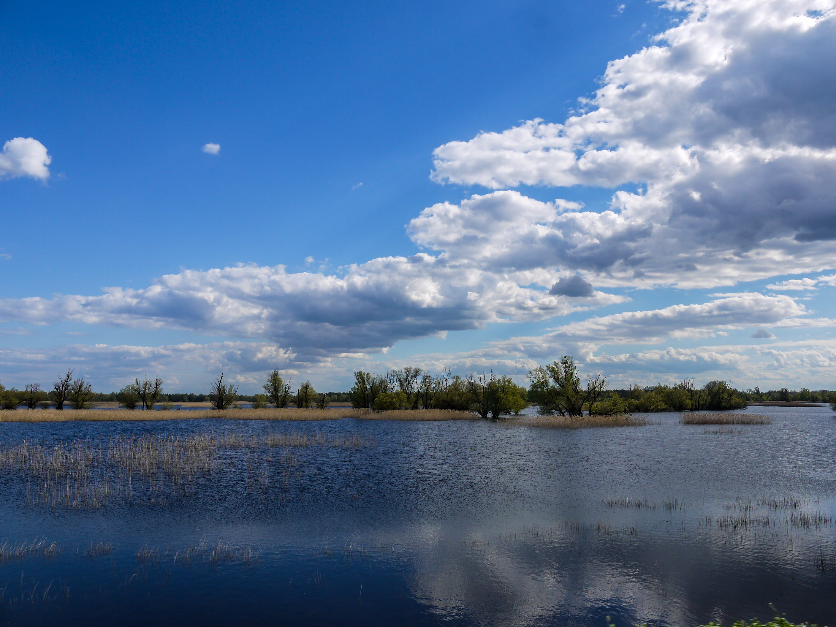 Kopacki rit